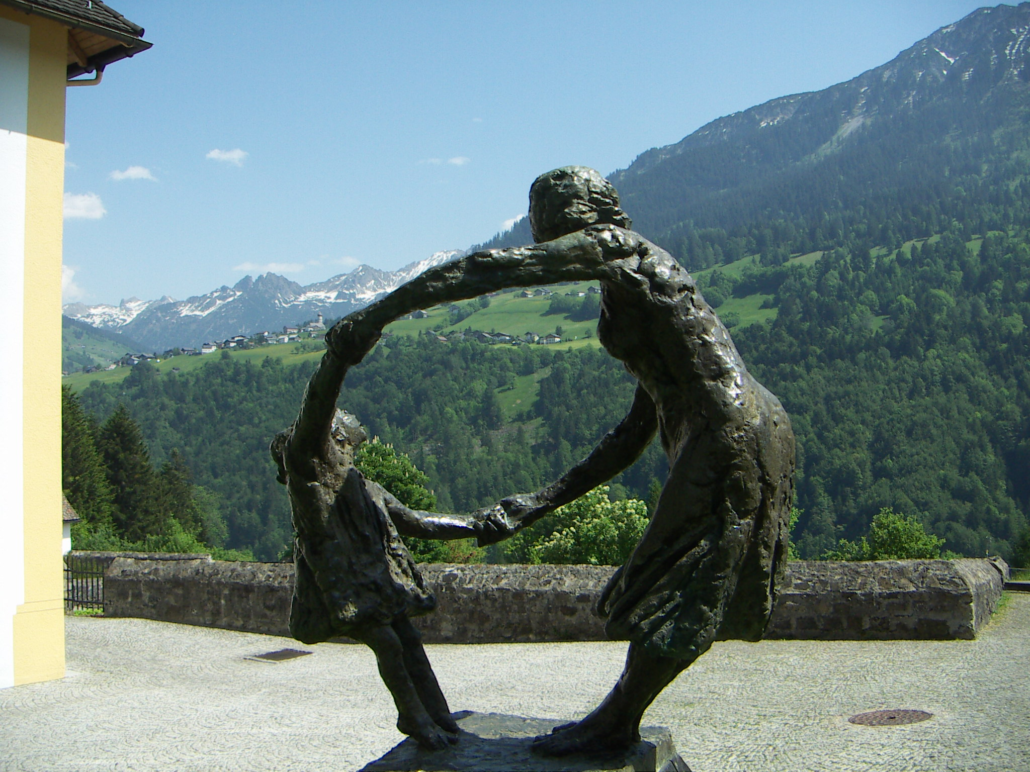 Plastik vom Bildhauer Hugo Imfeld, im Hintergrund der Ort Raggal